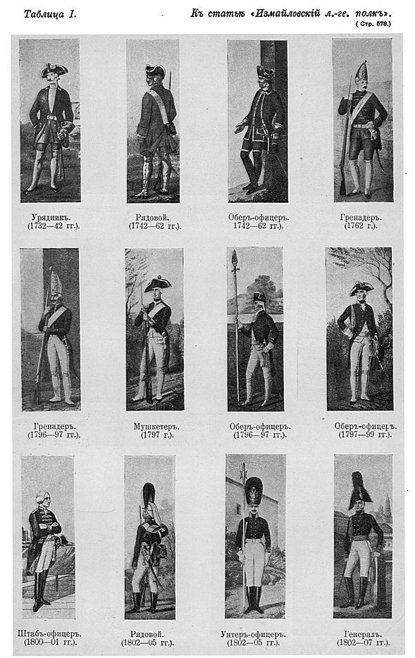 Это изображение было использовано для иллюстрирования статьи «Измайловский лейб-гвардии полк» опубликованной в десятом томе «Военной энциклопедии», который был издан книгоиздательским товариществом И. Д. Сытина в 1912—1913 гг. в столице Российской империи городе Санкт-Петербурге.